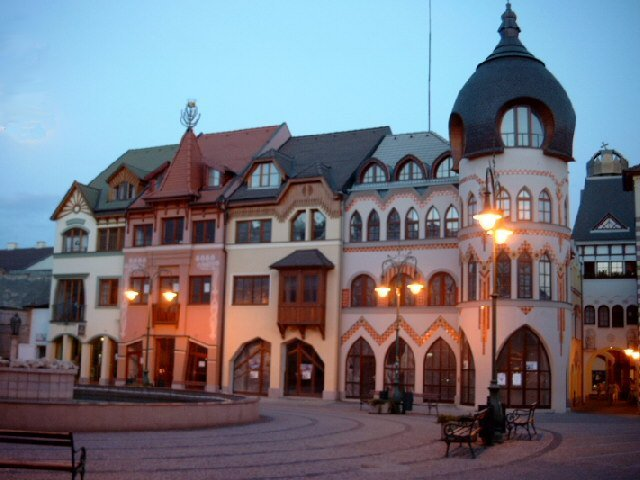 Eŭropa Korto en Komárno, orienta flanko. 2004.